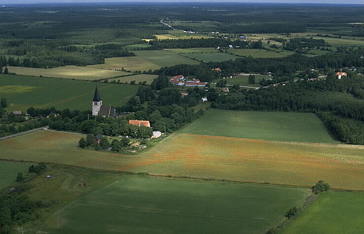 Motiv: Levide kyrka Nyckelord: Flygbilder, Riksintressen Kategori: KyrkomiljöLevide kyrka